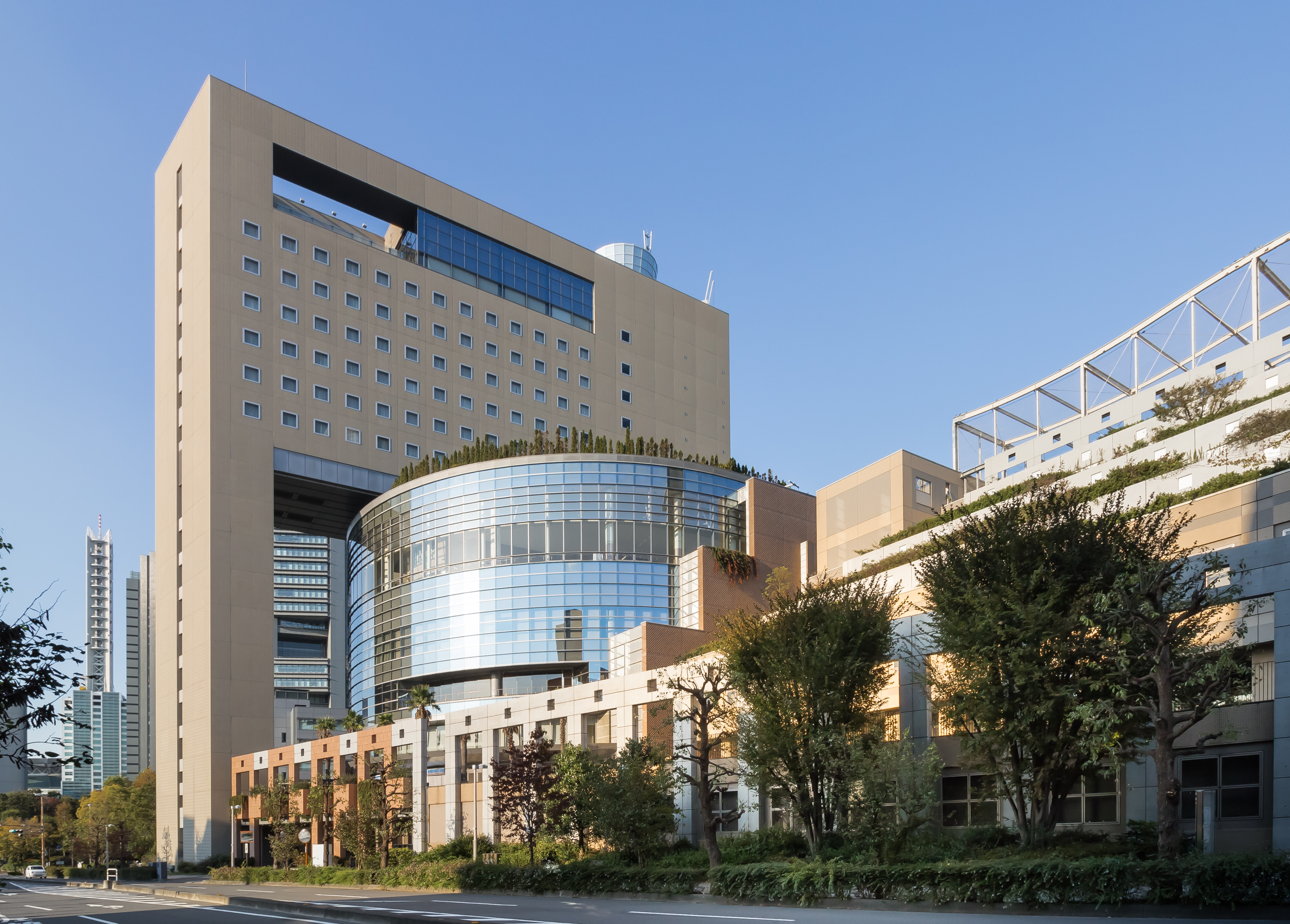 ラフレさいたま。山下設計（2000年）。